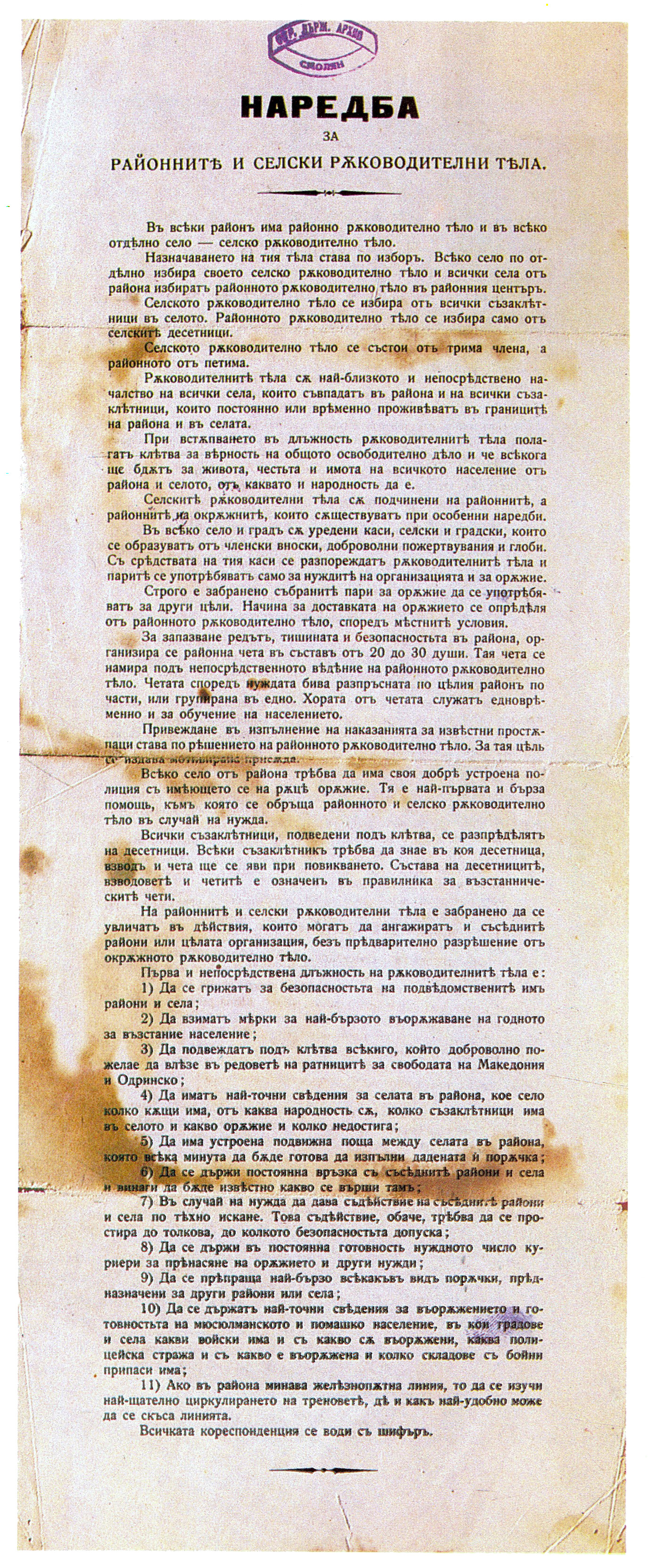 Наредба на ВМОРО за районните и селските ръководни тела.